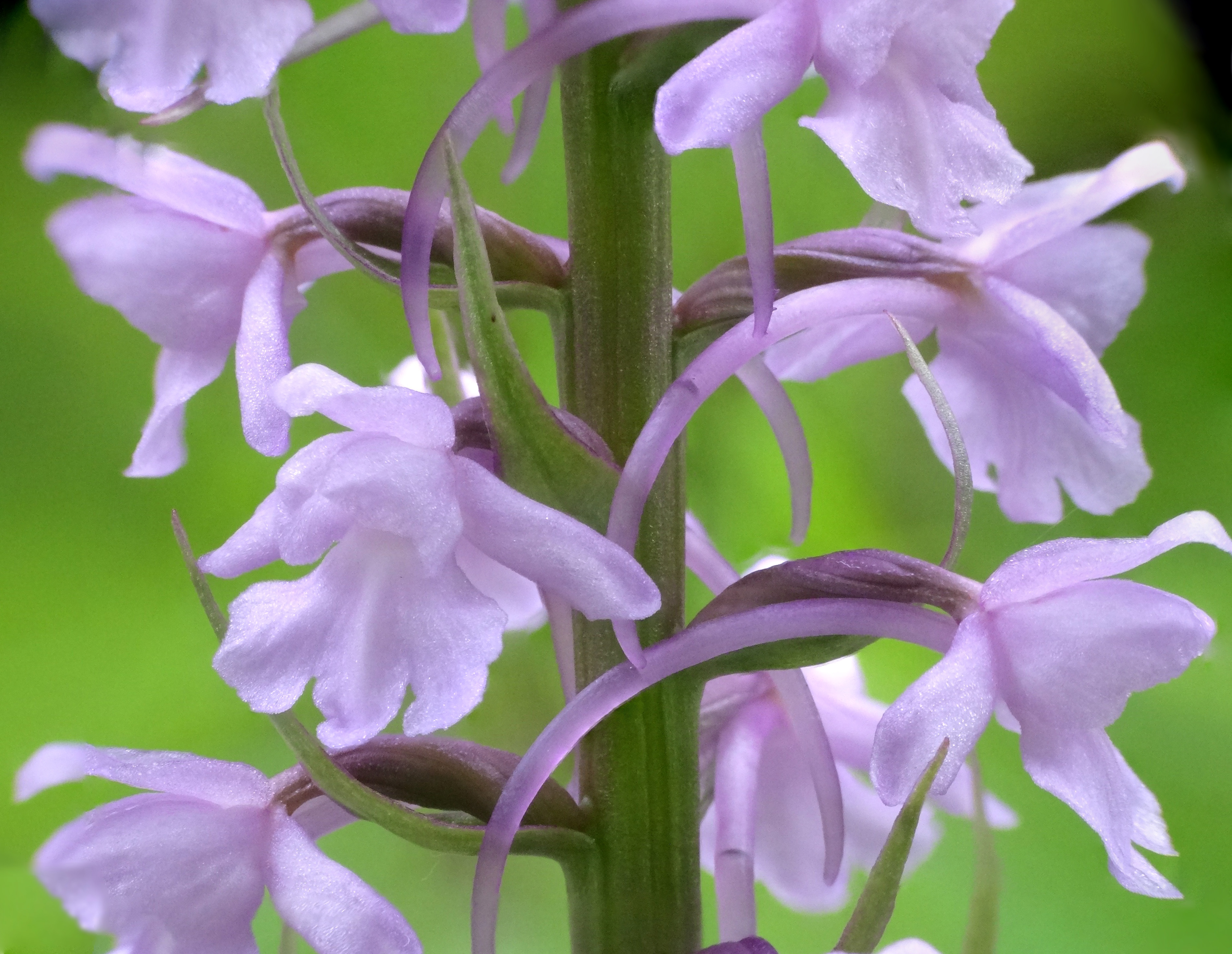 Mücken-Händelwurz (Gymnadenia conopsea), auch Langspornige Händelwurz, Blüten mit nektargefülltem Sporn, Tote Täler (Sachsen-Anhalt)